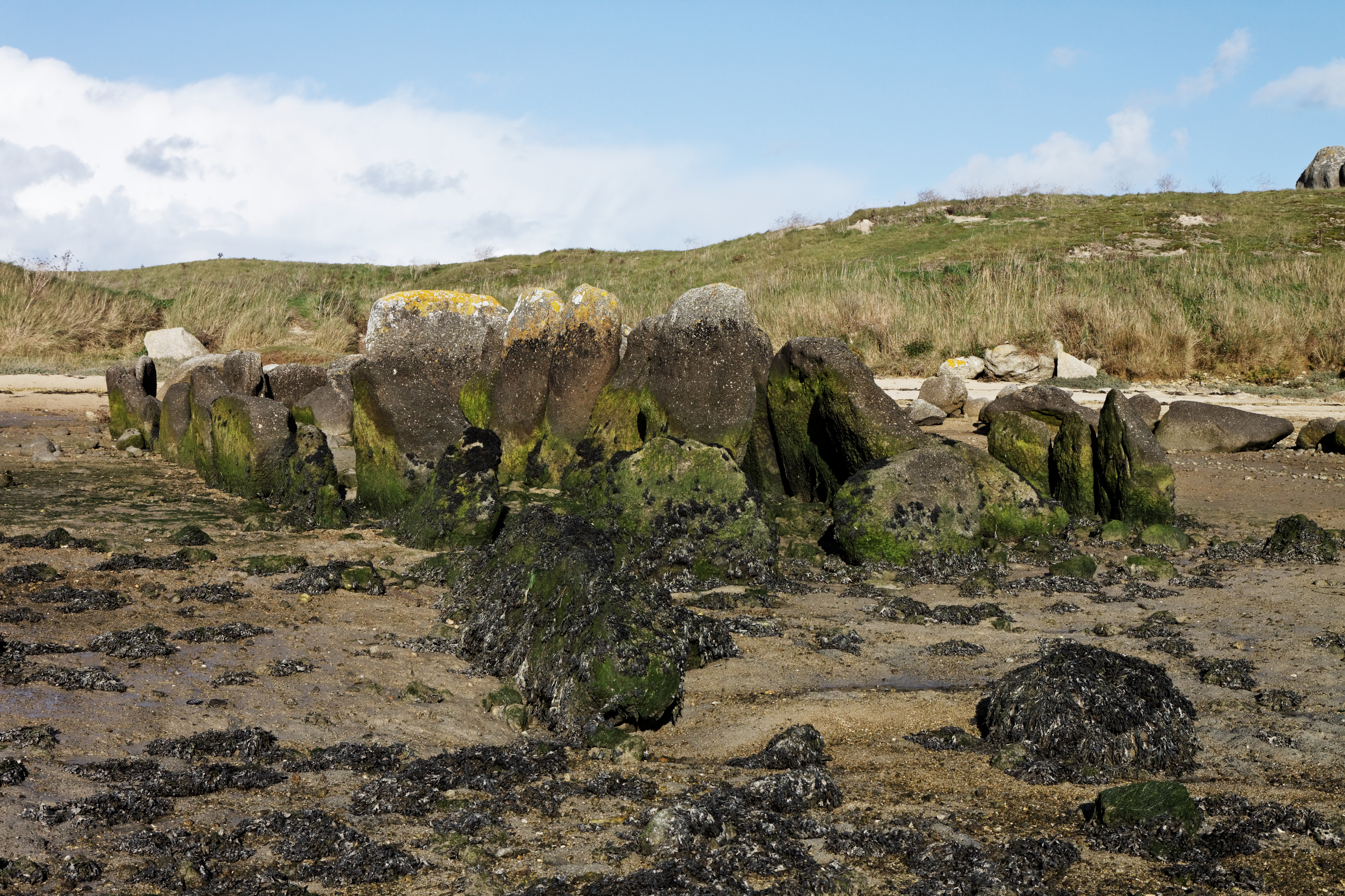 L'allée couverte de Guinirvit à Plouescat dans le Finistère. Elle a la particularité d'être couverte à marée haute et accessible à marée basse.